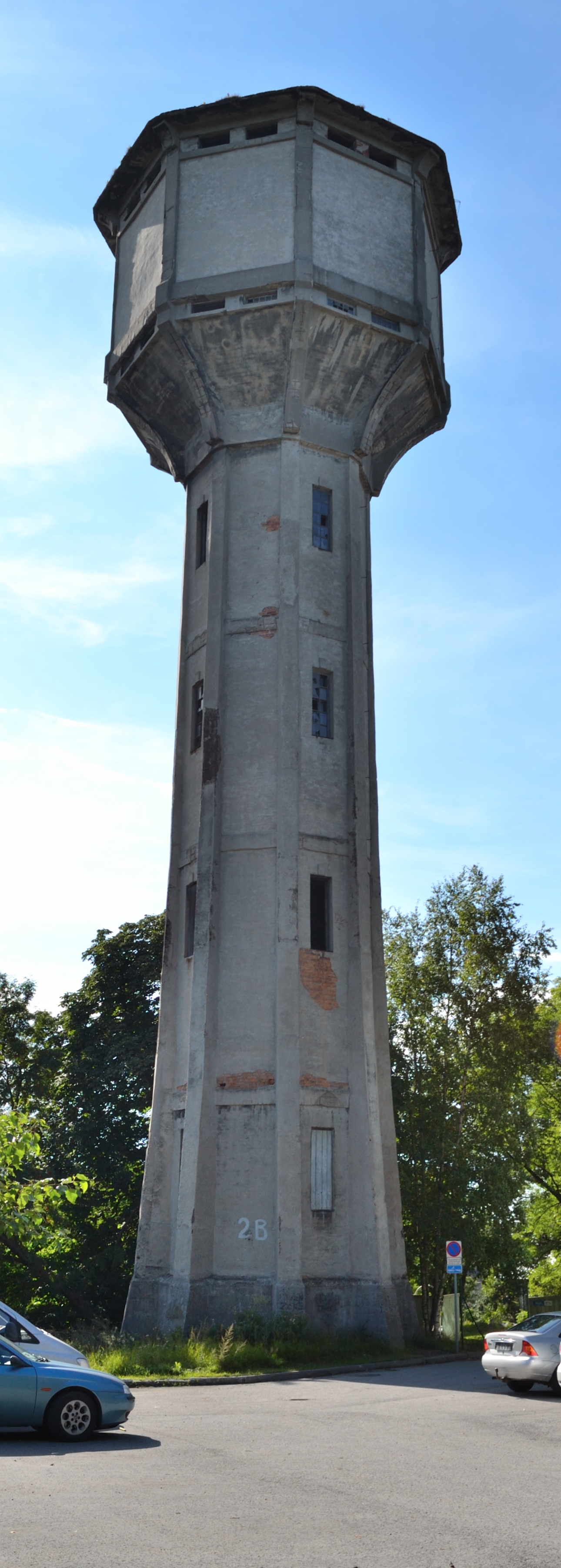 Tallinn, Kopli veetorn